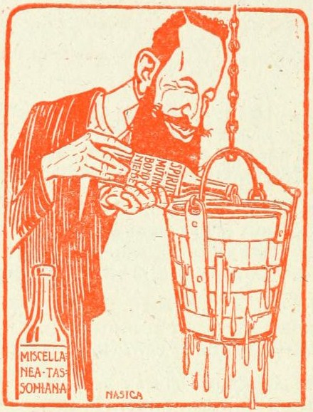 Illustration de La Secchia.